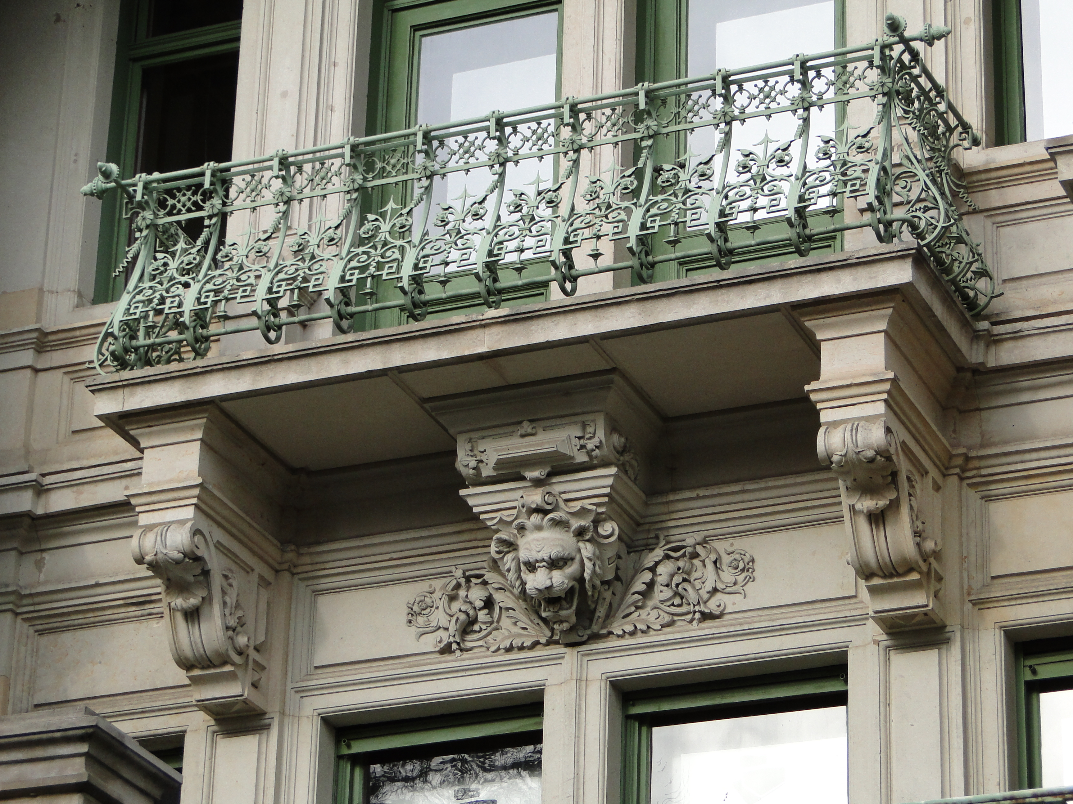 Villa Grumbt in Dresden, Balkon